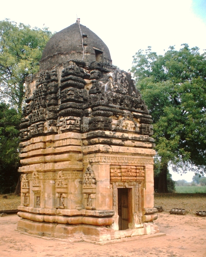 Amrol, Mahesvara-Mahdeva-Tempel